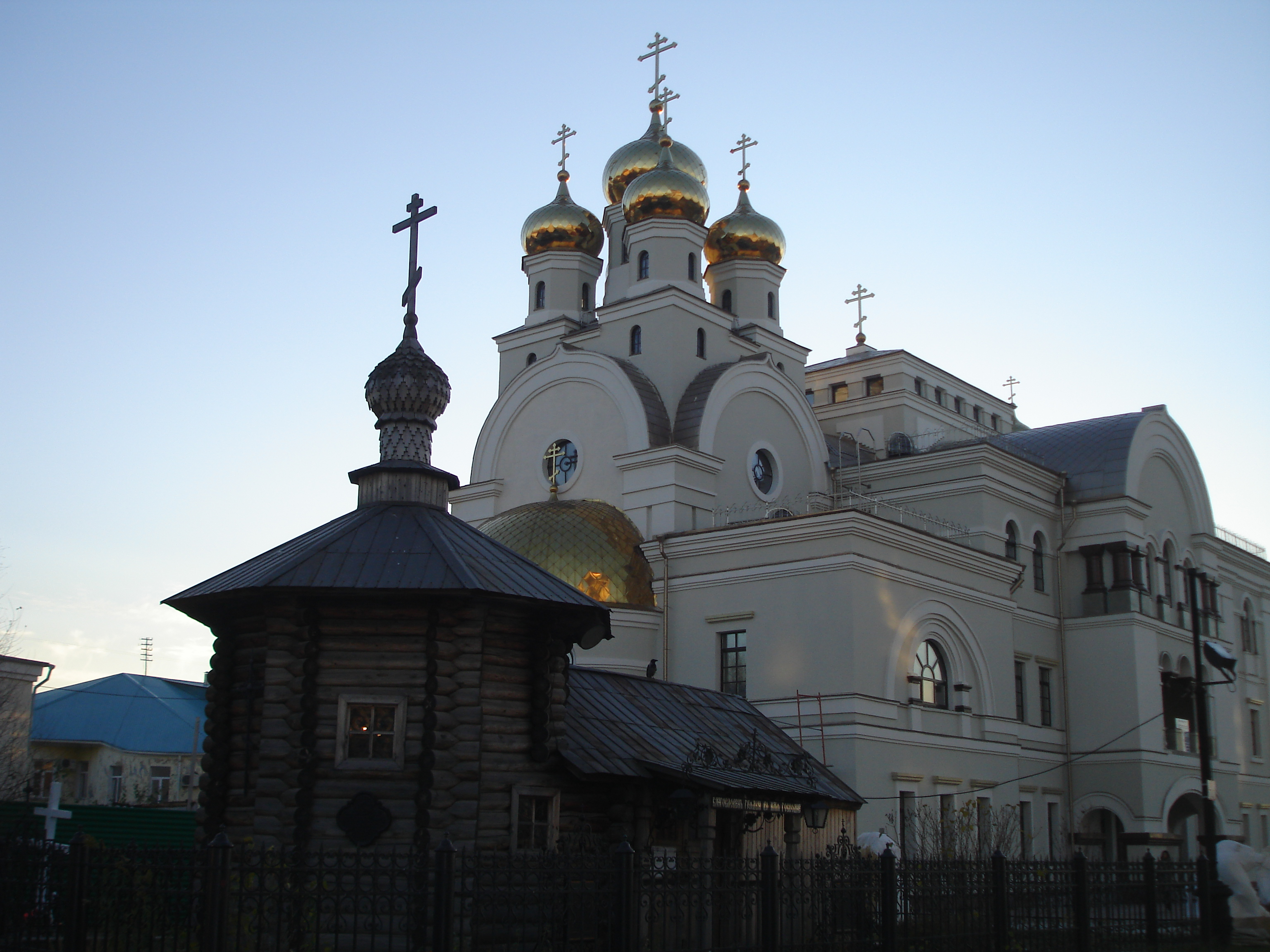 Часовня Великомученницы Елизаветы Фёдоровны и Патриаршее Подворье на месте гибели семьи последнего императора Николая II в Екатеринбурге